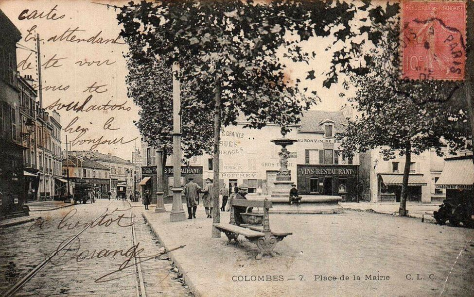 Colombes.Place de la Mairie.Place du Général-Leclerc